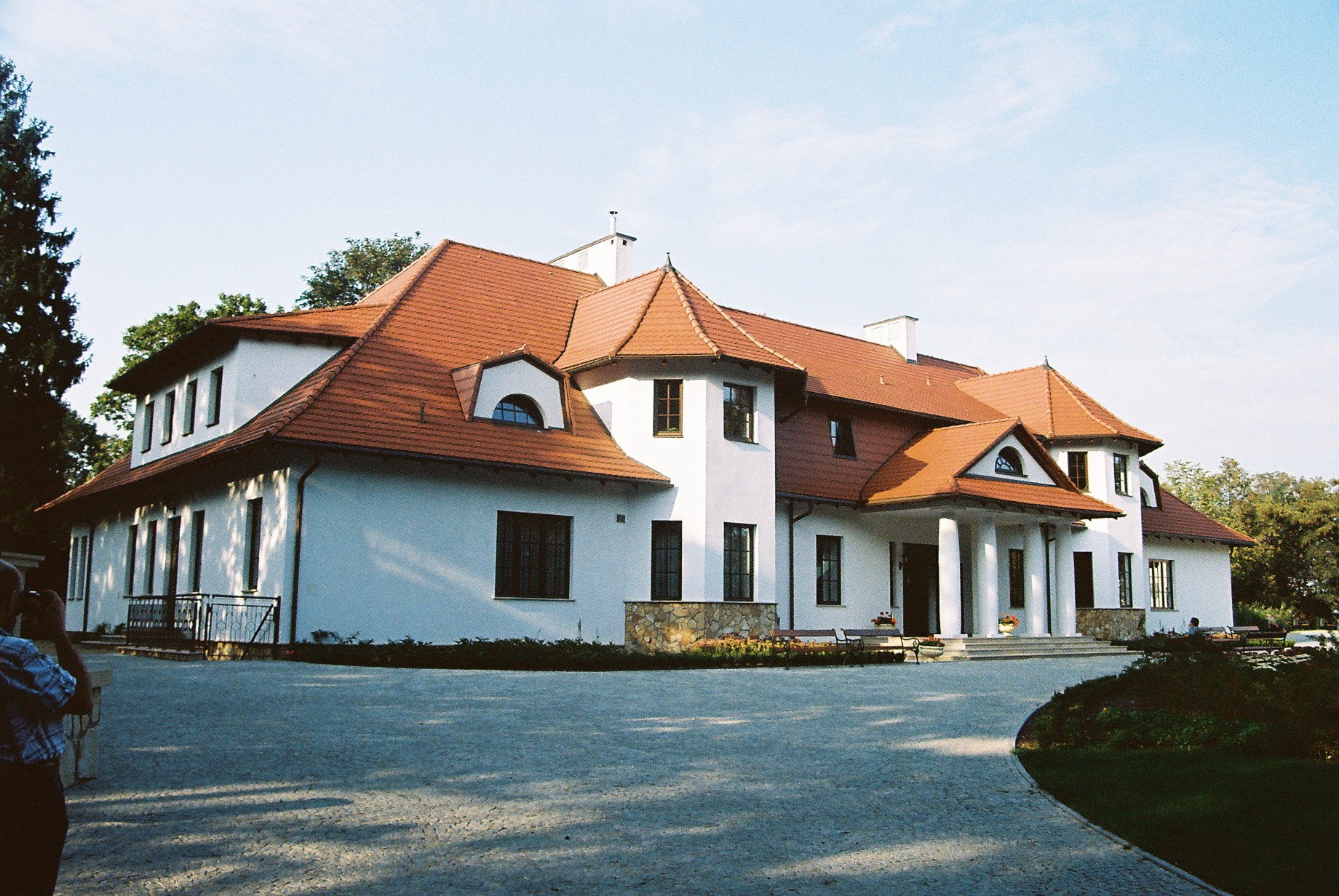 zespół pałacowy Krasińskich w Opinogórze Górnej - odbudowany dwór Krasińskich